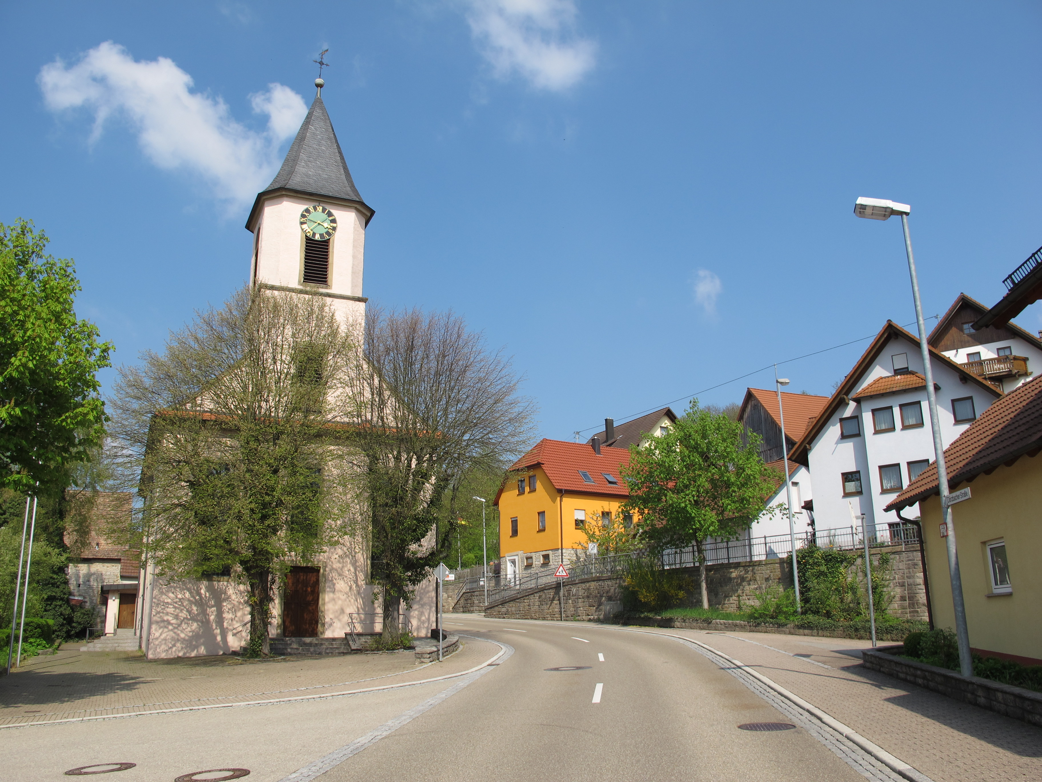 Ortsdurchfahrt der B19 in Rengershausen.